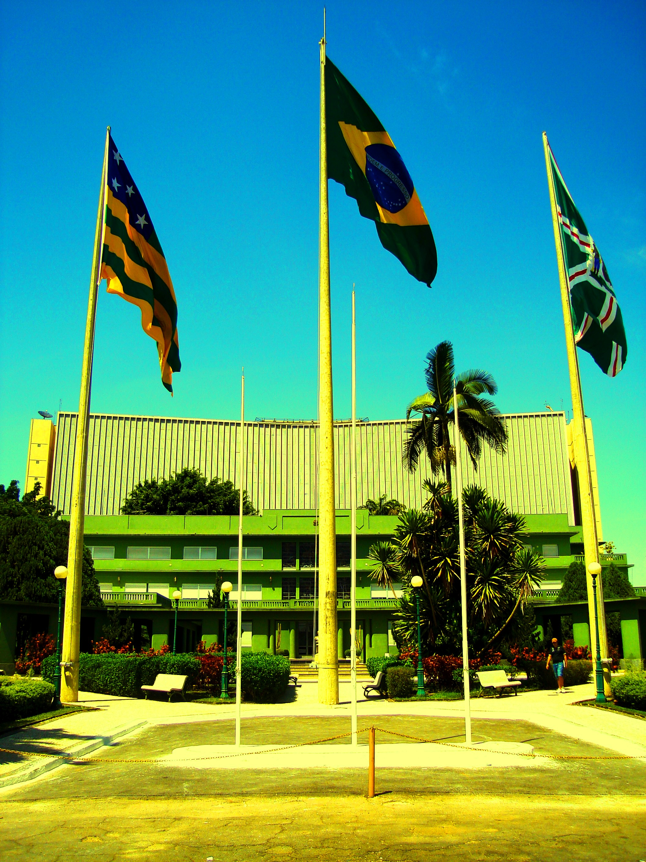 Fachada do Palácio das Esmeraldas, sede do Governo do Estado de Goiás, em Goiânia, Brasil.